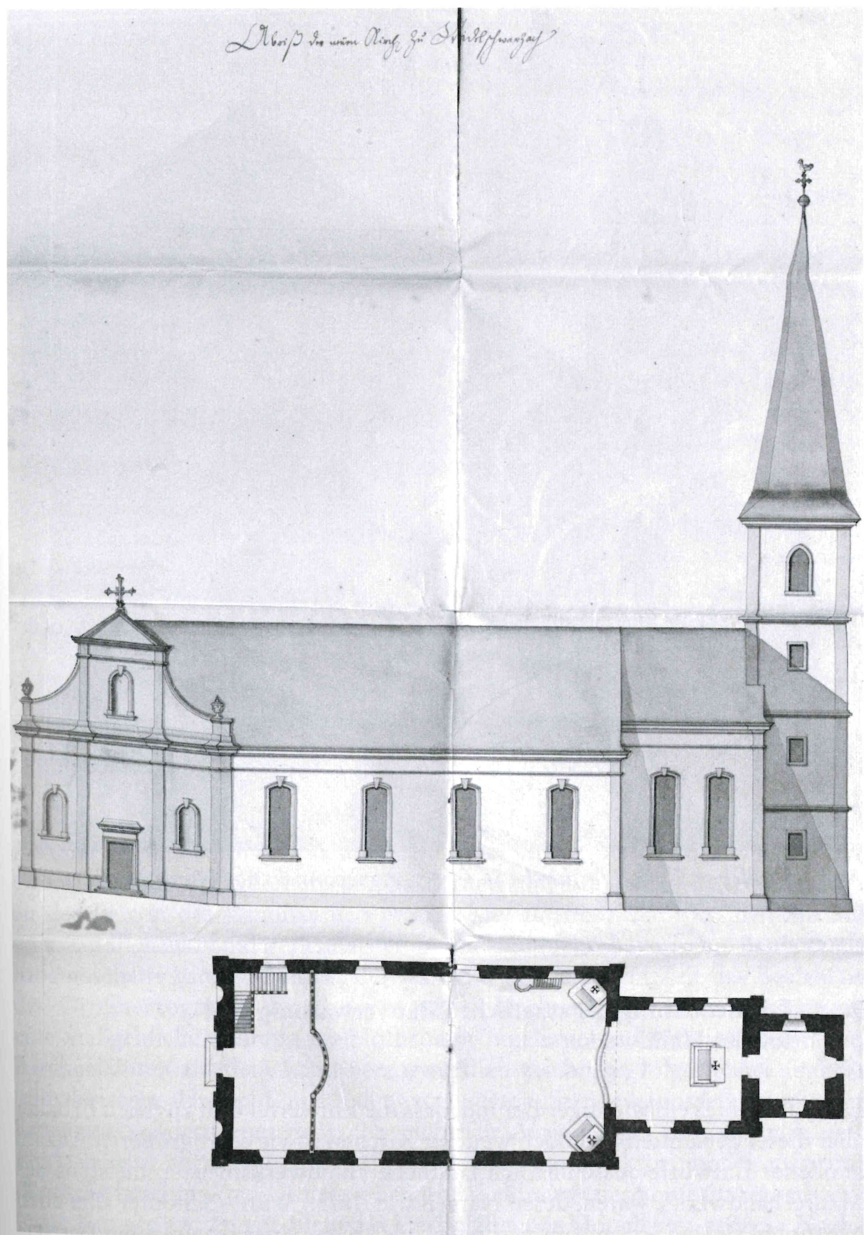 Entwurf des Kirchenneubaus der St. Bartholomäus-Kirche in Stadelschwarzach. Anton Wüst 1804.